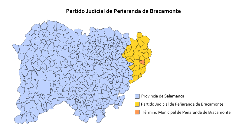 Mapa con la localización del Partido Judicial de Peñaranda de Bracamonte en la Provincia de Salamanca. Esta delimitación ha supuesto desde 1833 la aparición de una delimitación territorial institucionalizada de la Comarca de Peñaranda, y si bien no se corresponde con las divisiones típicas comarcales o con las actuales divisiones mancomunales, sí ha supuesto y sigue siendo una referencia para la delimitación de dicha Comarca.